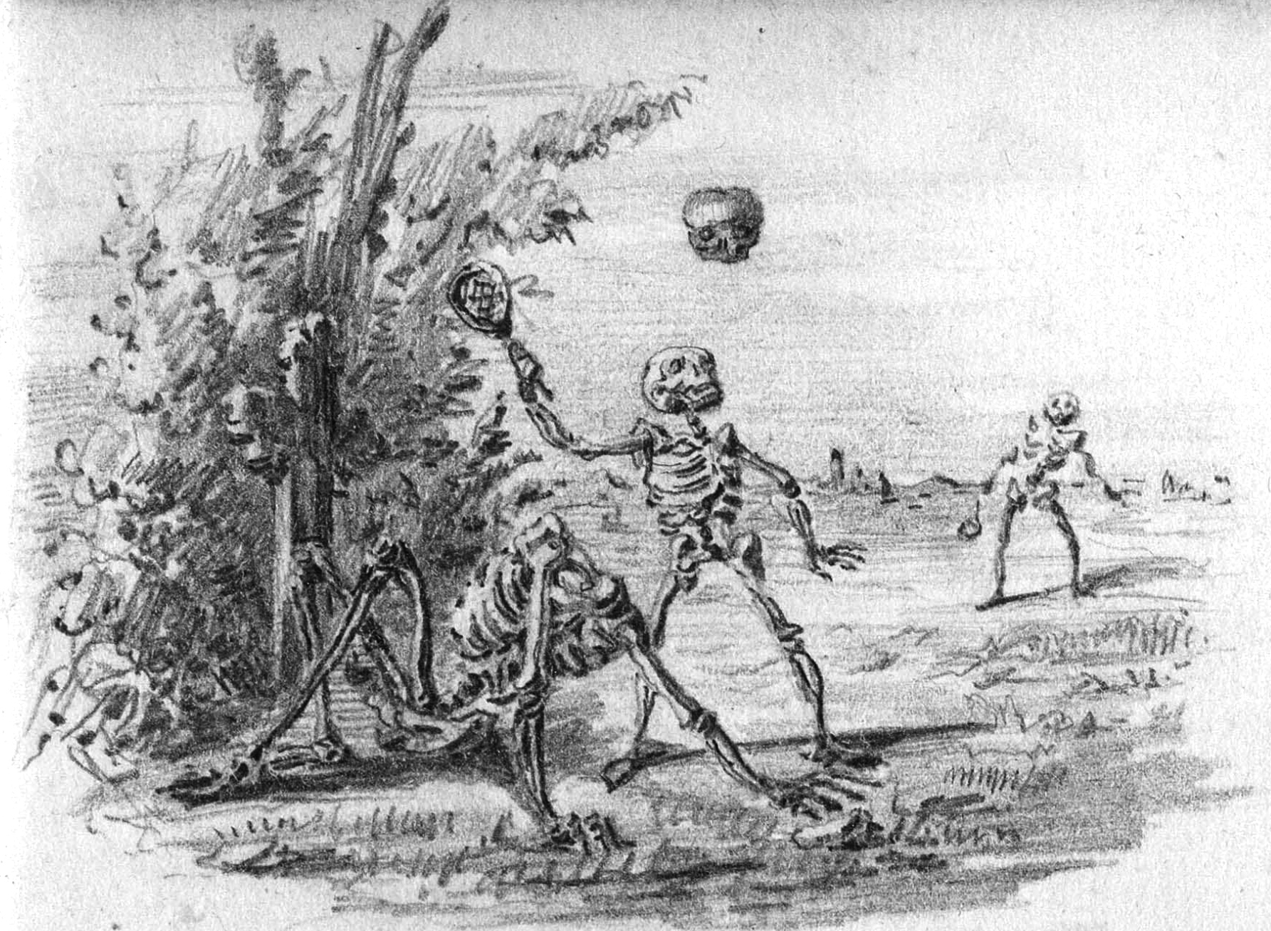 Detalle de "Les morts pour rire" de G.A. Bécquer